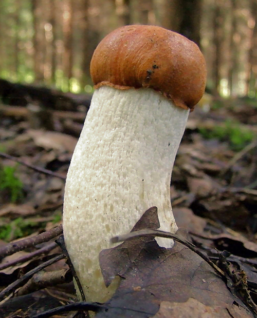 "Leccinum aurantiacum". Karmėlava forest, Lithuania.